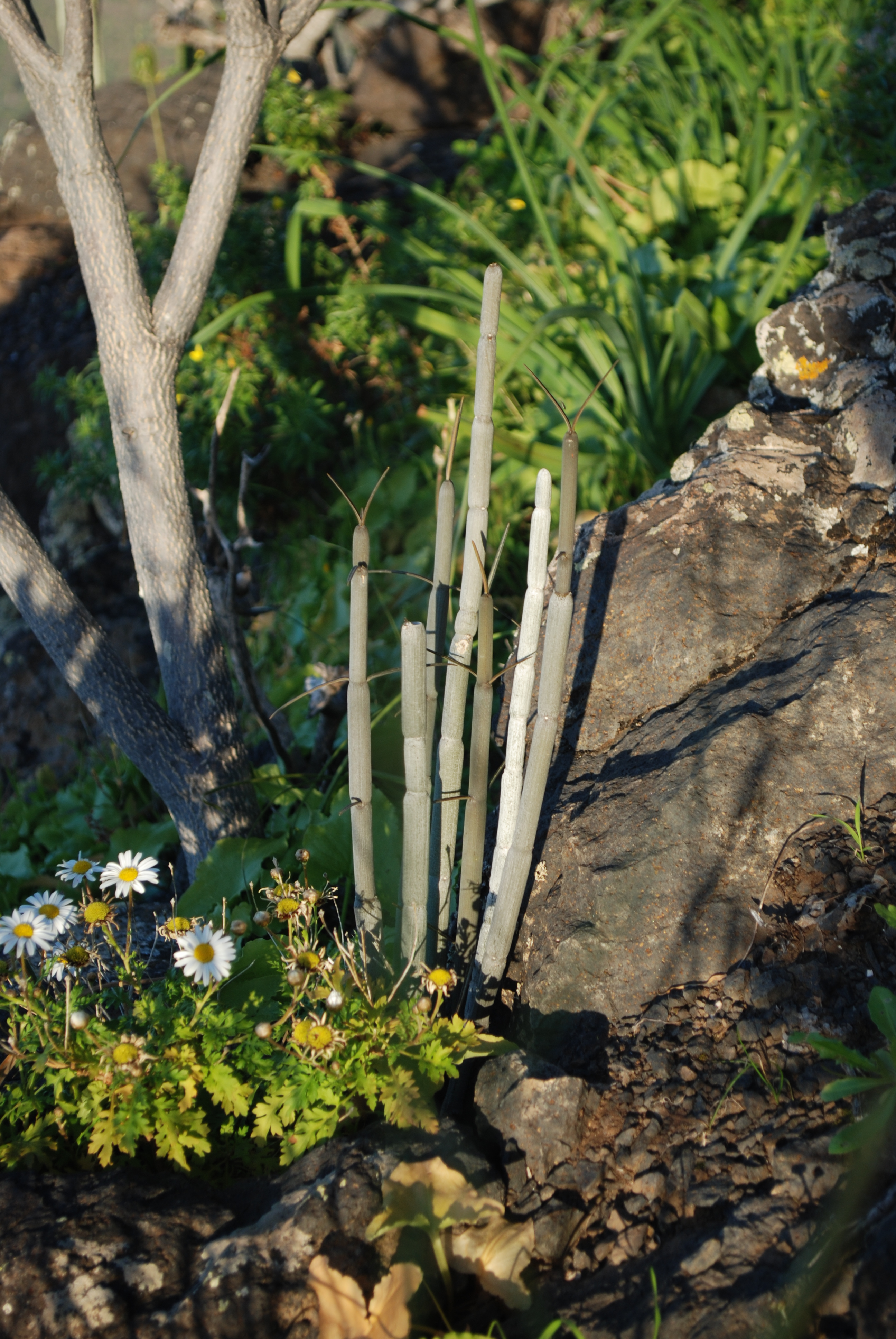 Cardoncillo (Ceropegia fusca) en Agaete, Gran Canaria.